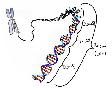 رسمٌ بيانيّ يُظهرُ منطقة الترميز في جُزءٍ من الحمض النووي حقيقيّ النواة.